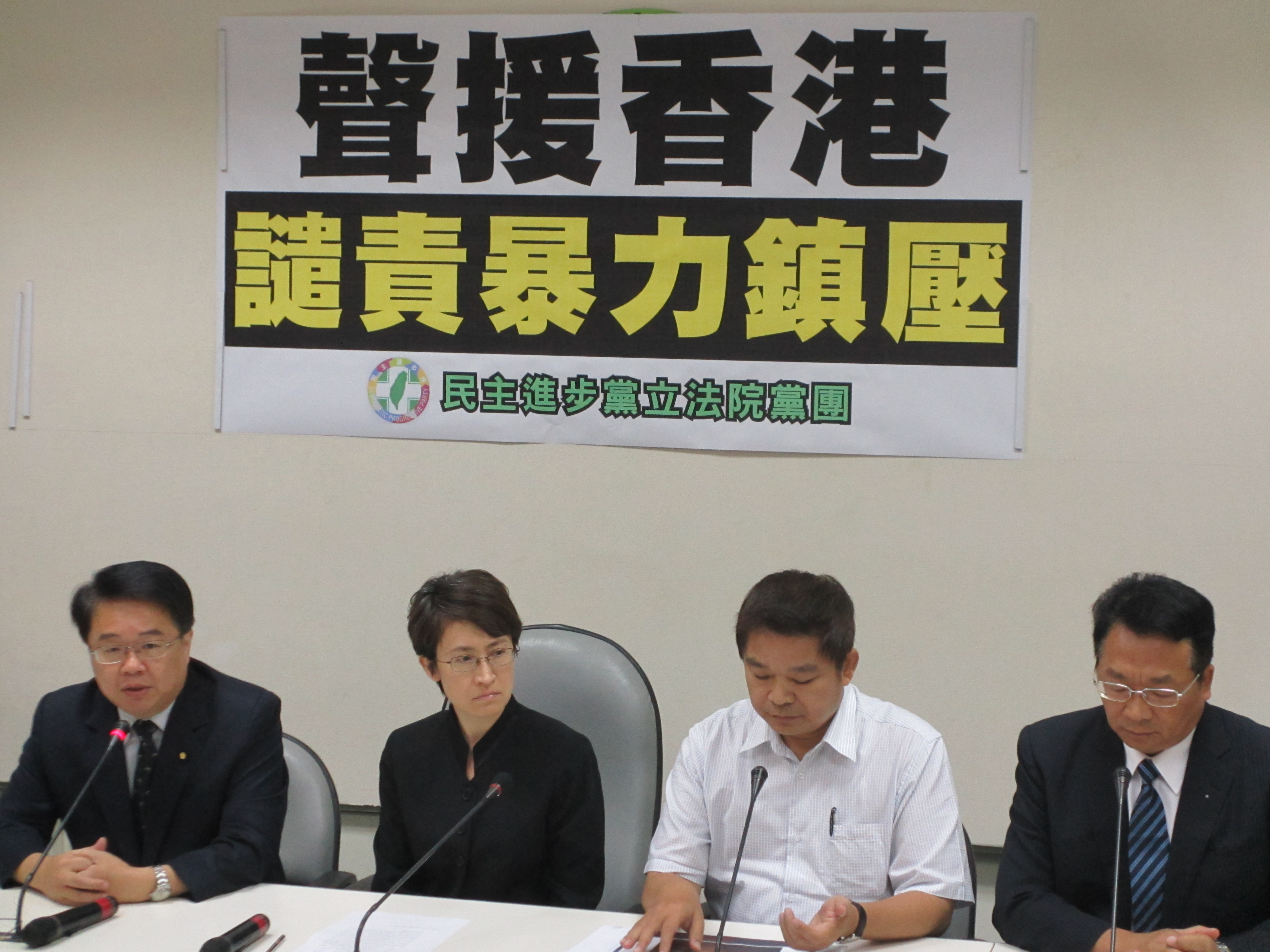 中文（台灣）: 台灣在野黨民進黨立法院黨團就香港情勢召開記者會(美國之音張永泰拍攝)